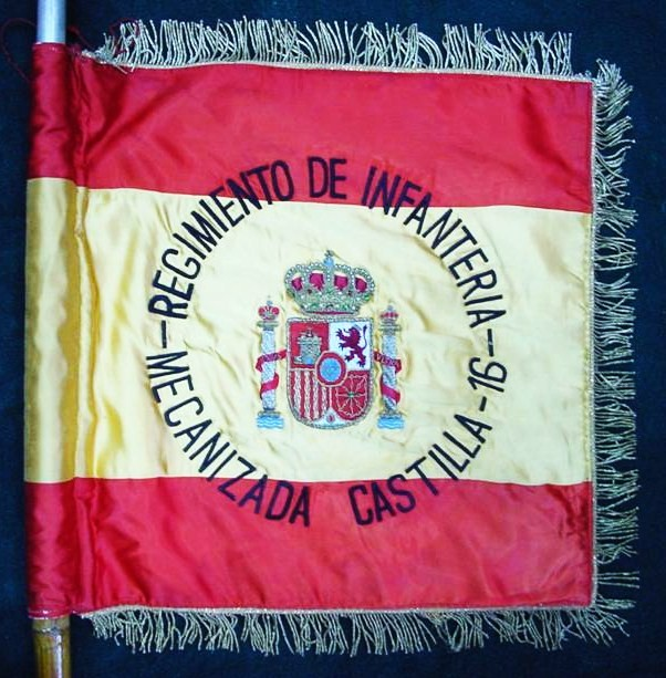 Banderin del Regimiento de Infantería Mecanizada Castilla nº 16